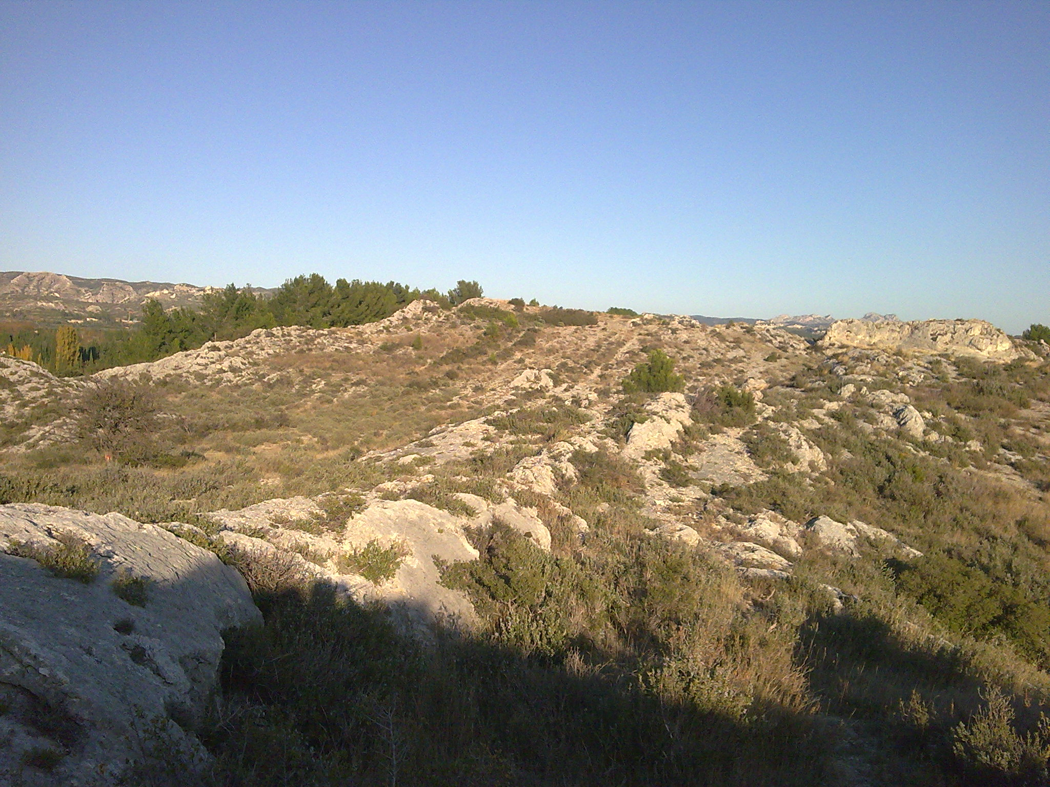 Chaîne de la Pène (Maussane-les-Alpilles)